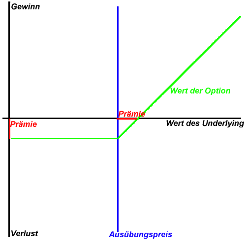 Auszahlungsdiagramm Long Call